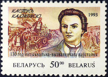 Беларуская (тарашкевіца): Кастусь Каліноўскі. Белпошта